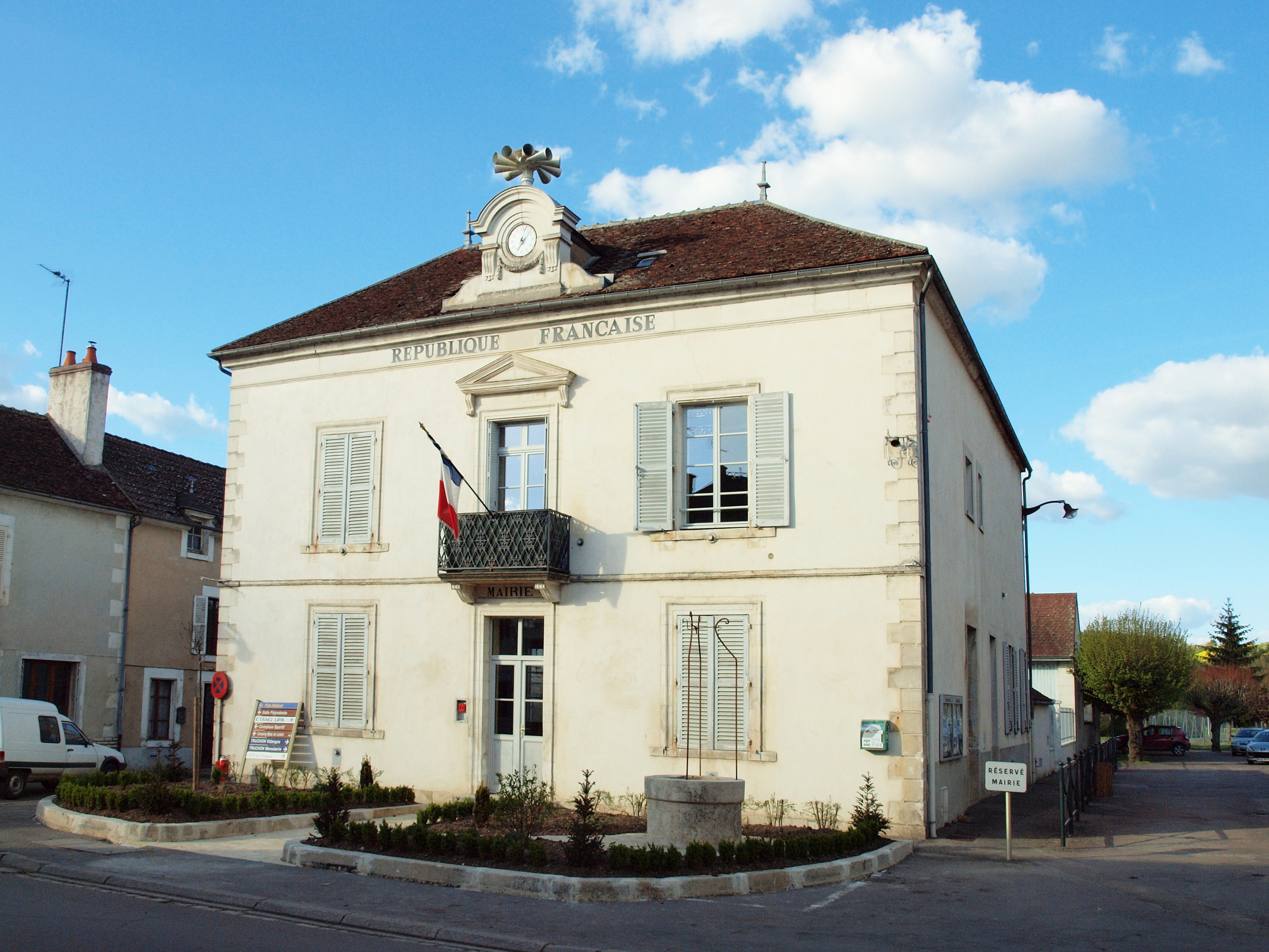 Vincelles (Yonne, France)